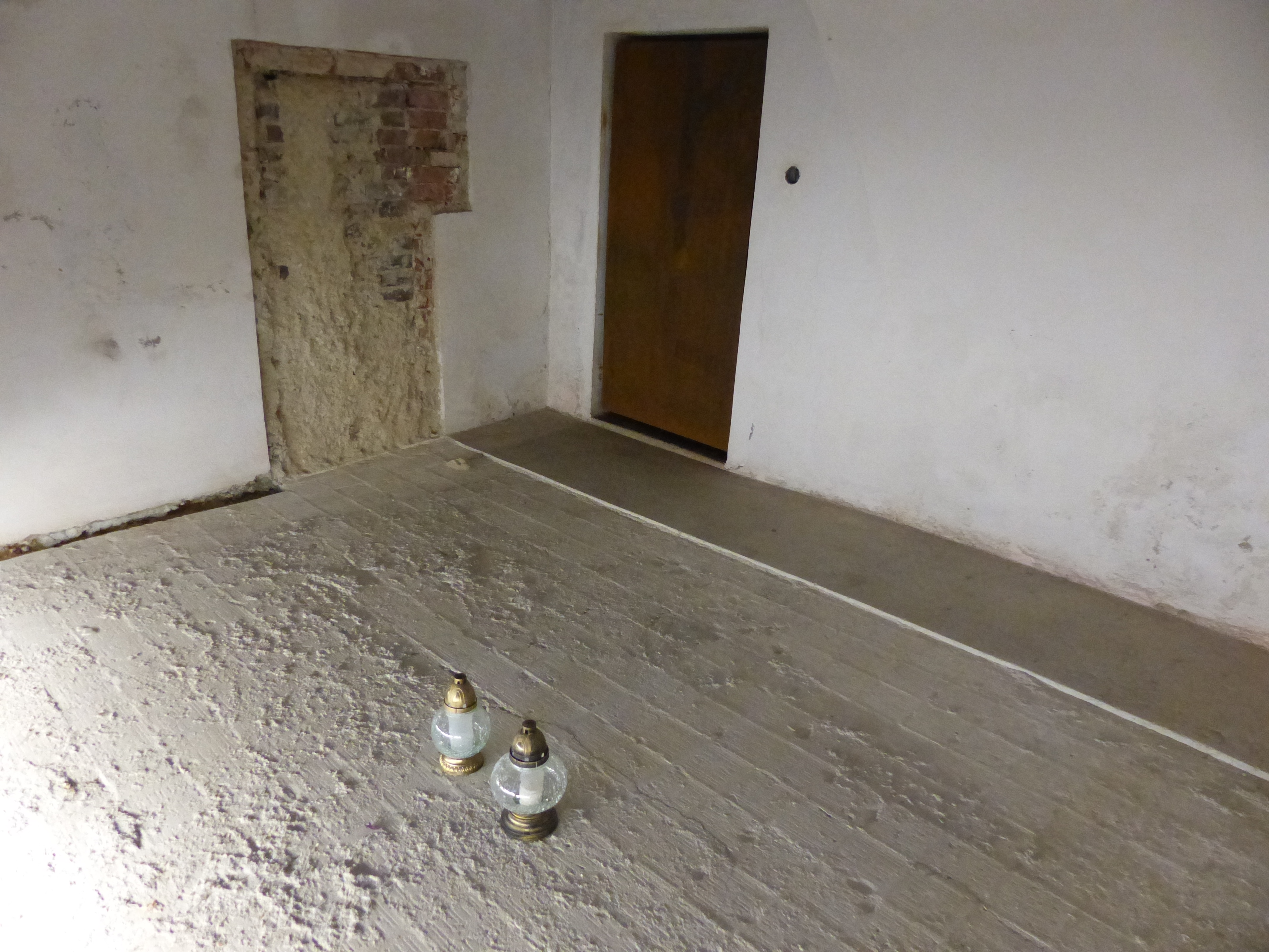 Schloss Hartheim Gaskammer:In diesen Raum fand die Tötung von ca. 30.000 Menschen statt.